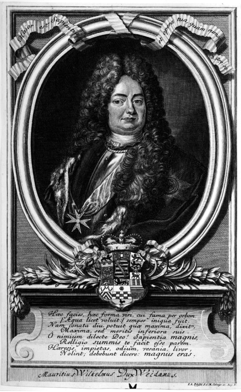 Herzog Moritz Wilhelm von Sachsen-Zeit (1664-1718)